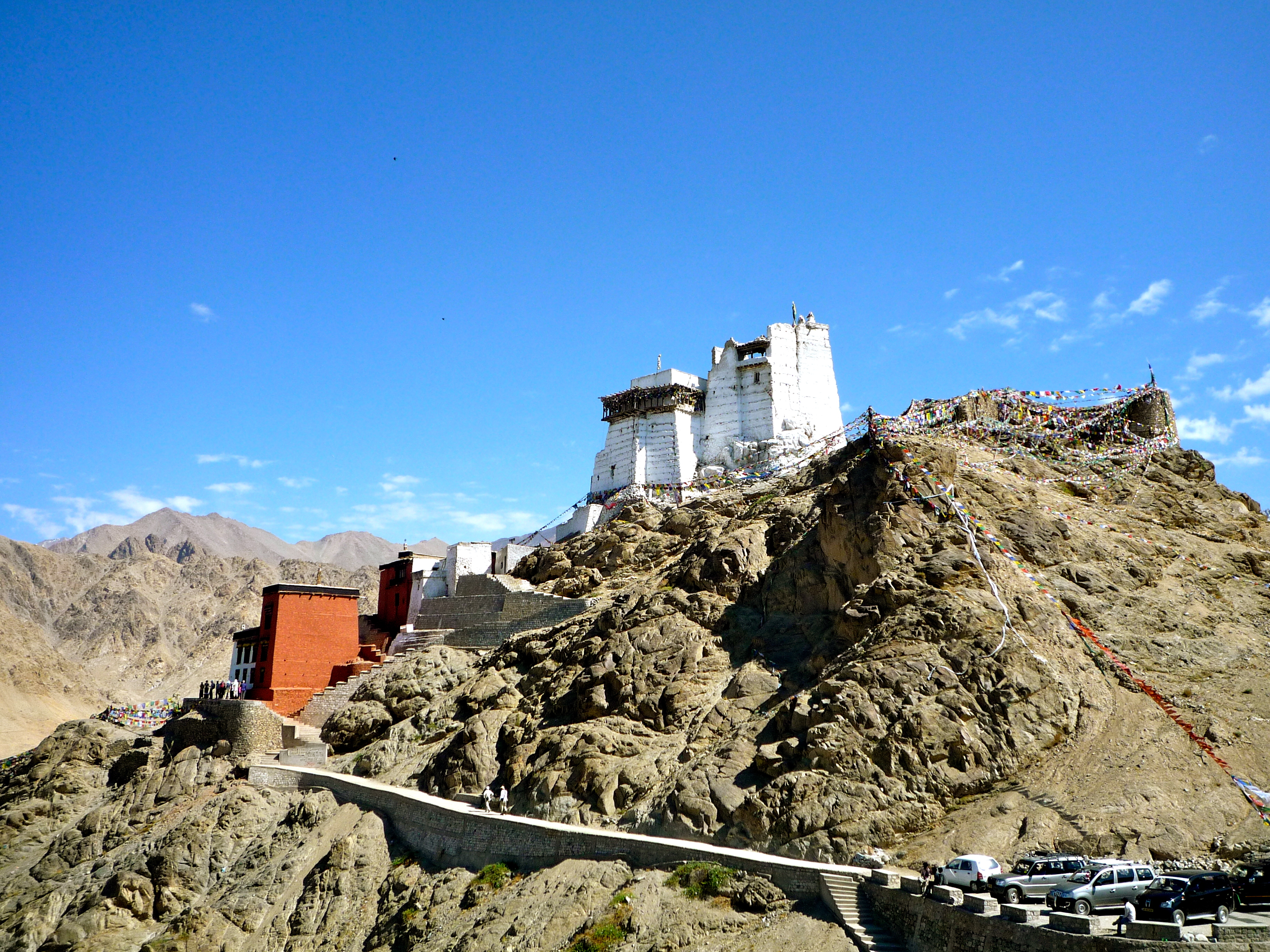 Le Namgyal Tsemo. En rouge à gauche le temple de Maitreya et un temple dédié aux divinités protectrices.